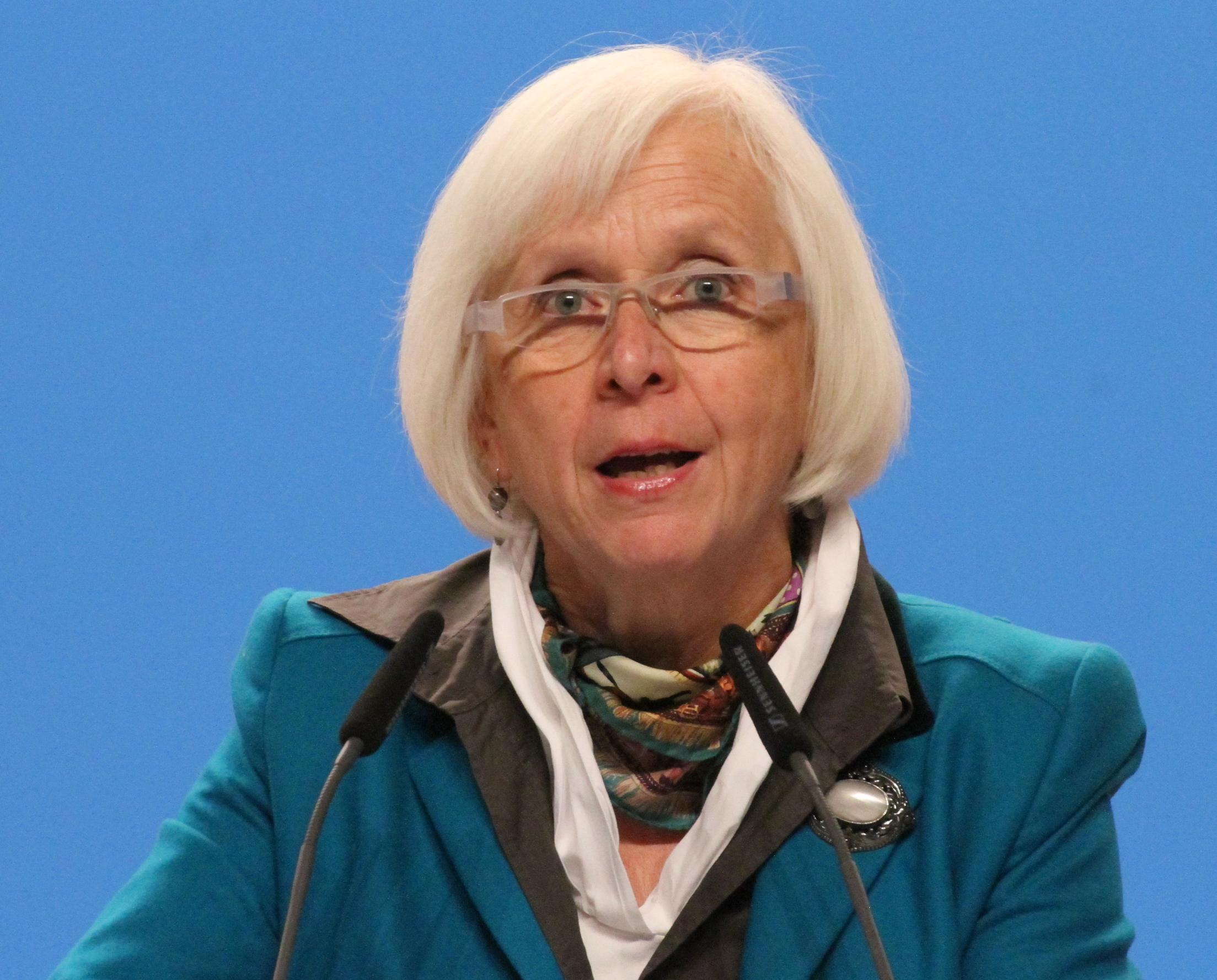 Gudrun Heute-Bluhm auf dem CDU Bundesparteitag Dezember 2014 in Köln